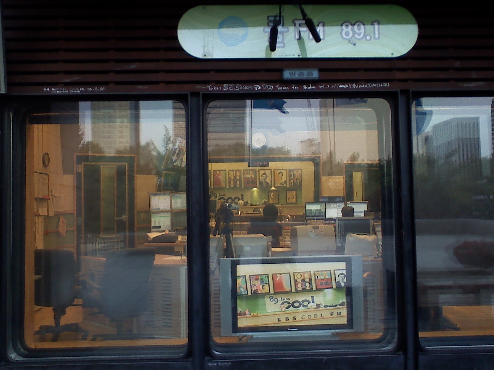 KBS 2FM(쿨FM)의 스튜디오입니다.